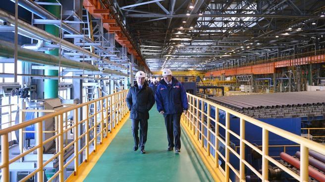 Северский трубный завод. Визит Д. А. Медведева 24 октября 2014 года. Осмотр технологической линии трубопрокатного стана